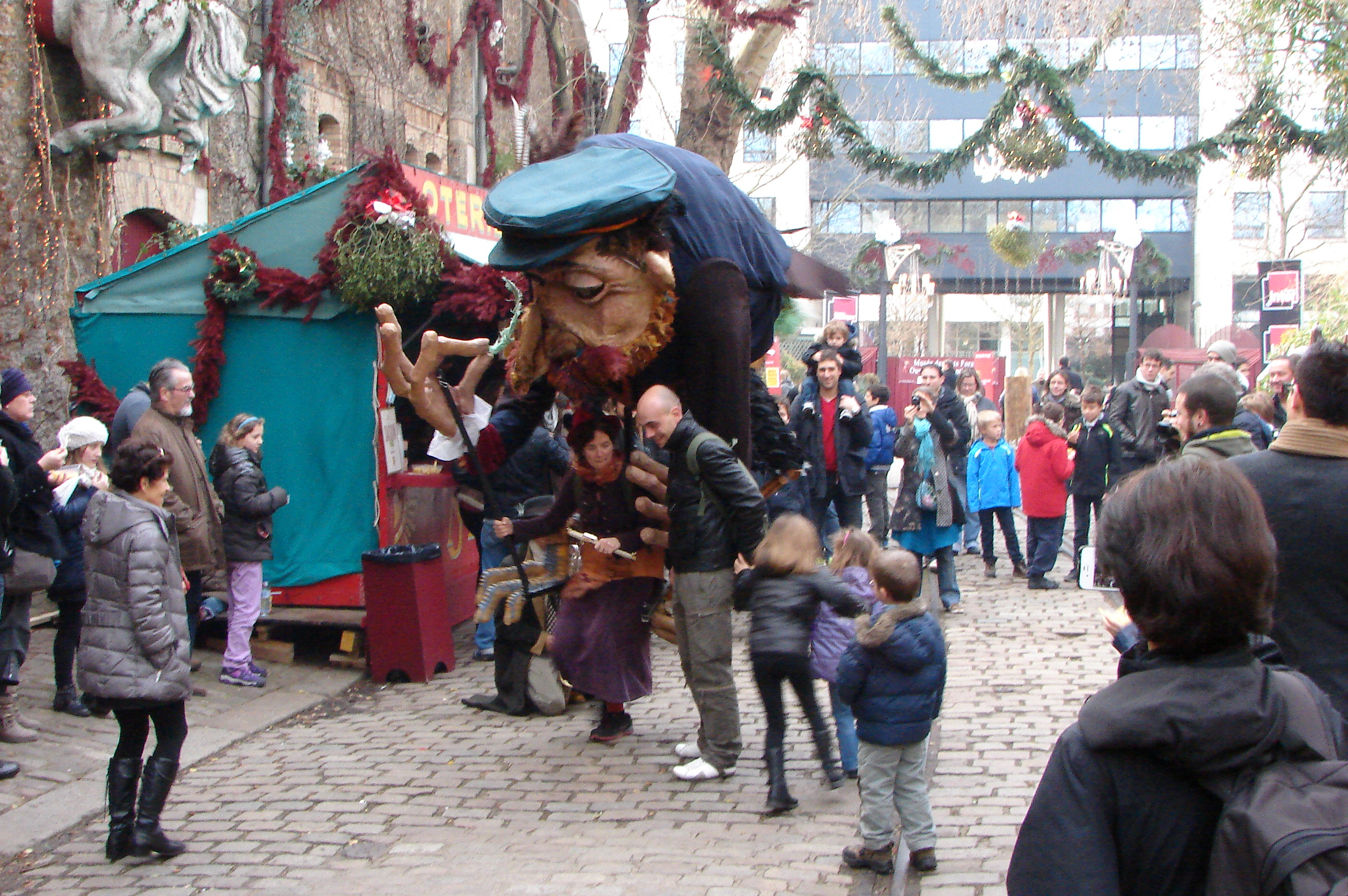 Spectacle vivant du Musée des Arts forains : "La Balade de l'Homme-Oiseau et son Chimère Orchestra" (marionnette géante et musiciens costumés).